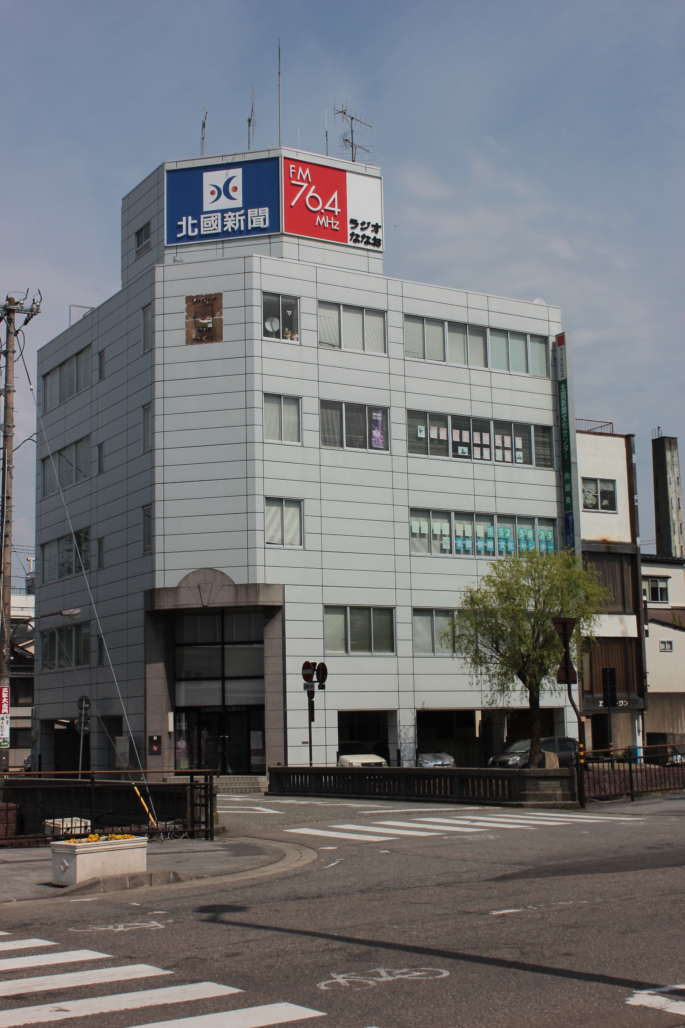 ラジオななお本社・北國新聞社七尾支社（石川県七尾市） Canon EOS Kiss X5